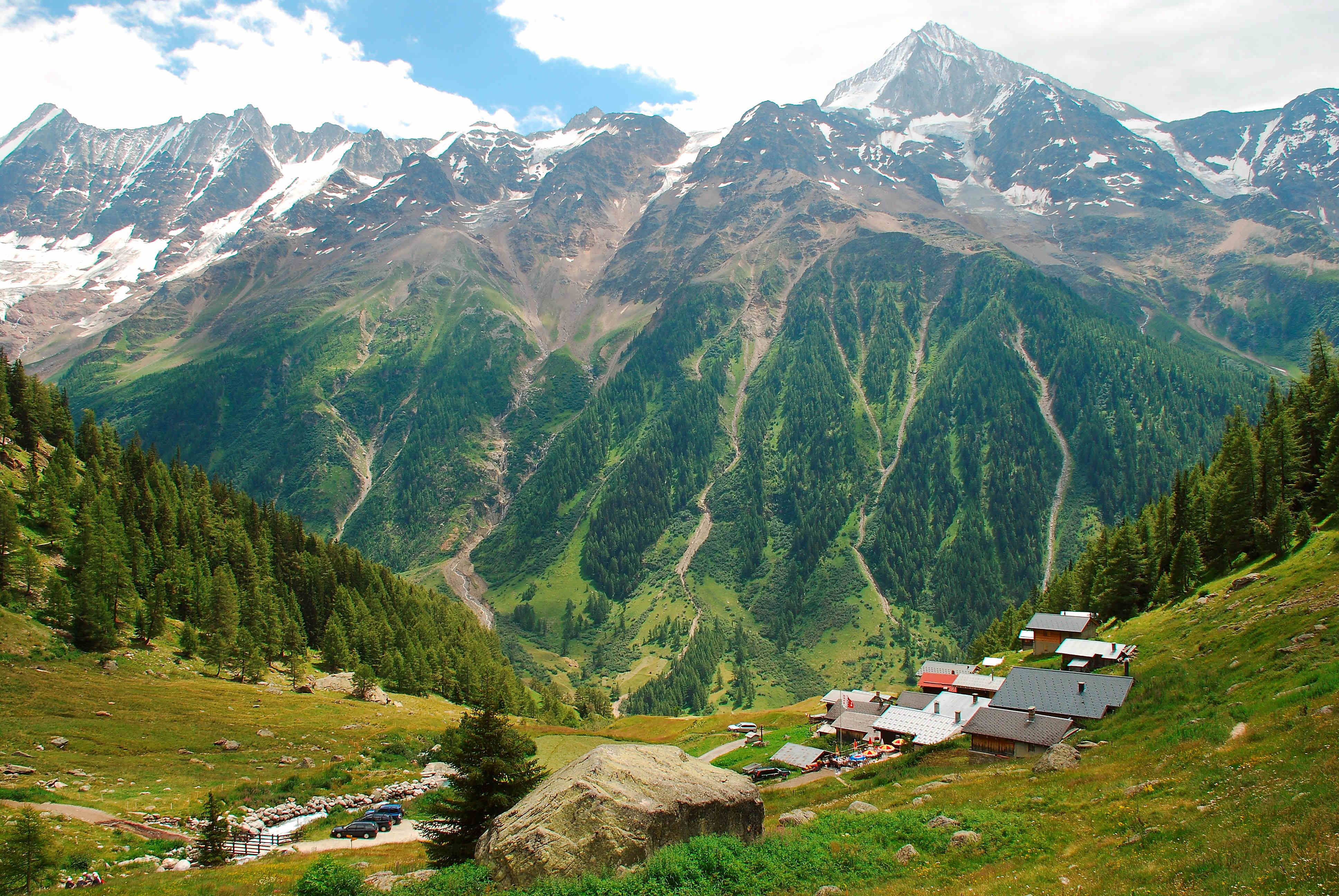 en.: Tellialp at Lötschental, Switzerland; dt.: Tellialp im Lötschentals, Schweiz